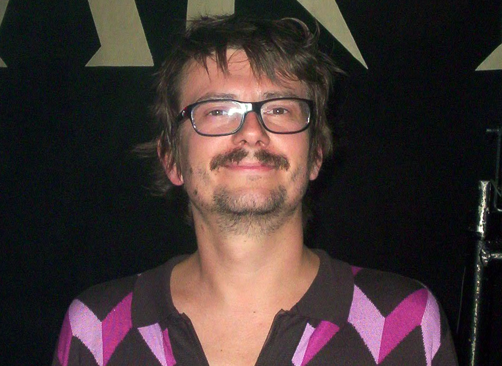 Il vignettista francese Luz nel luglio 2007